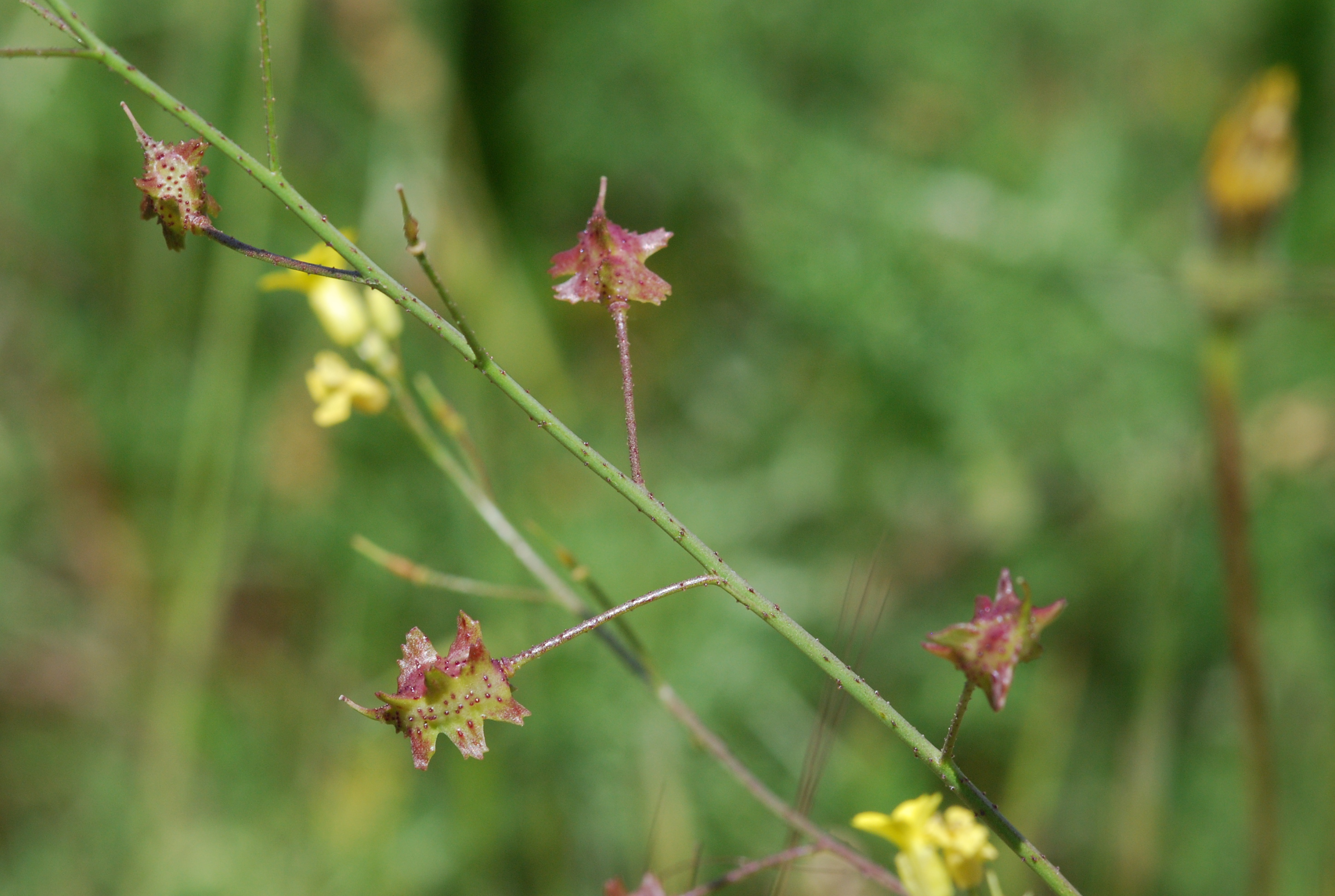 Bunias erucago fruit